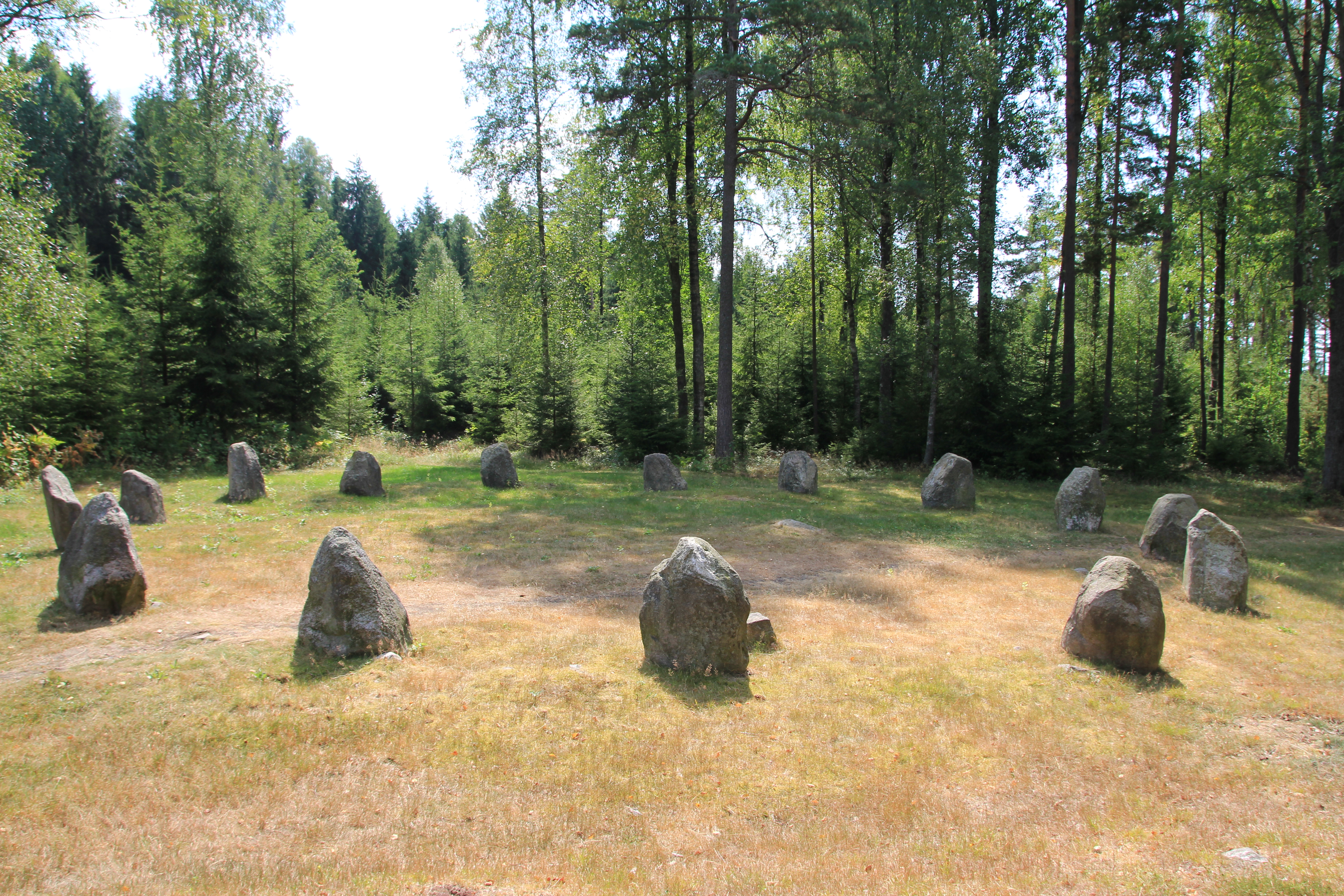 Gravfeltene ved Hunn